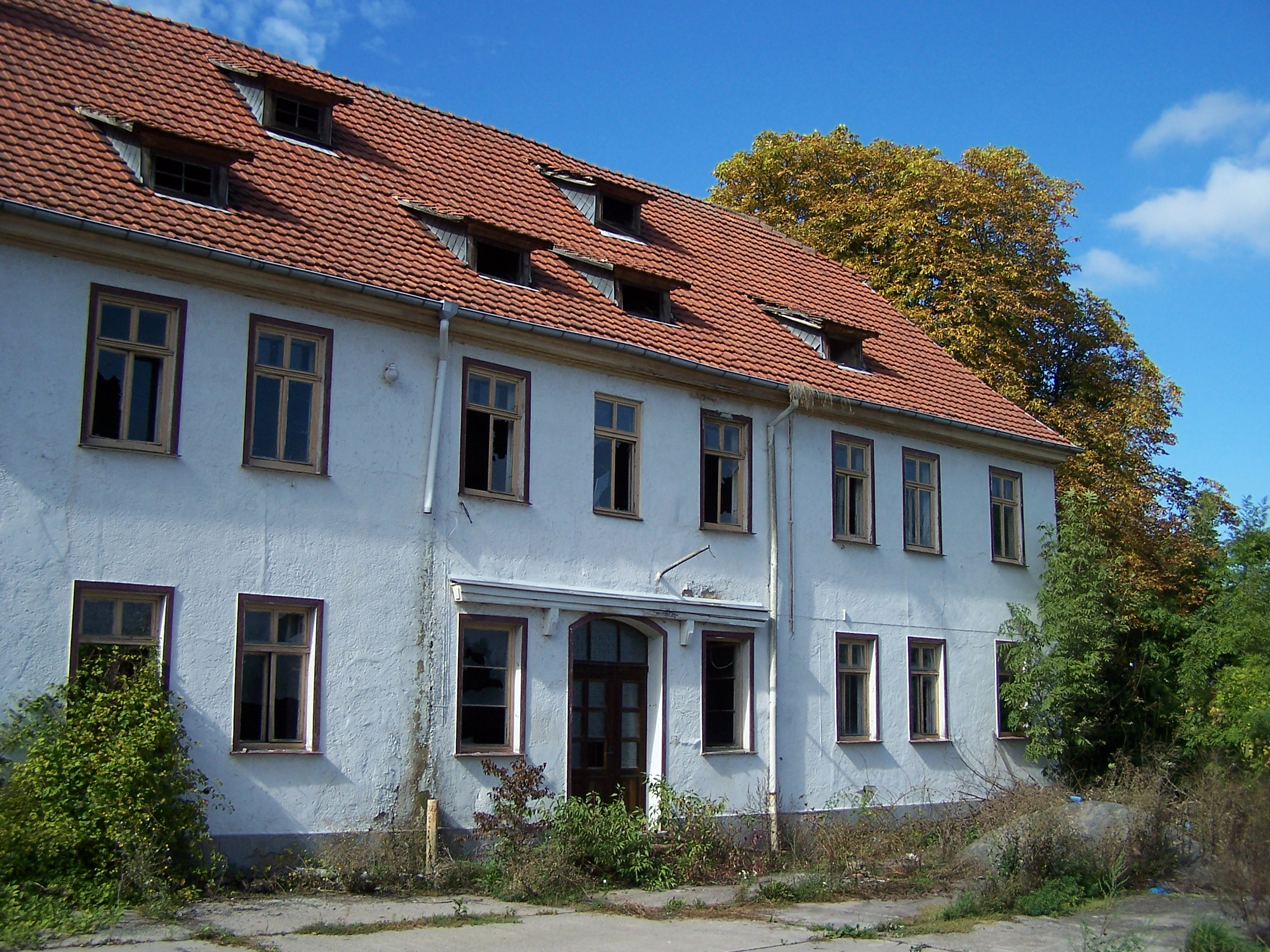 Deubachshof, das Haupthaus.